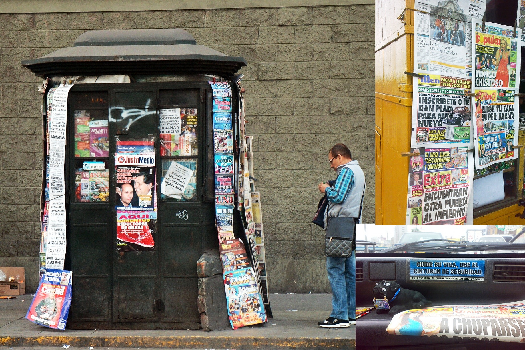 Un collage de la prensa chicha en el Perú, usando varios quiscos. A la izquiera una tienda regular; a la derecha superior, "portadas sugerentes; a la derecha inferior una plana de Ajá en un taxi limeño.